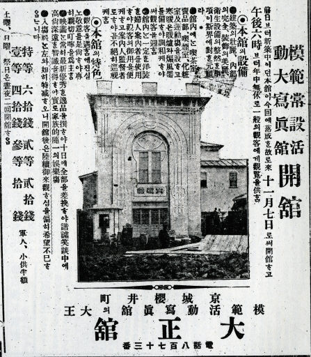 京城府の映画館、大正館開館広告、1912年11月7日